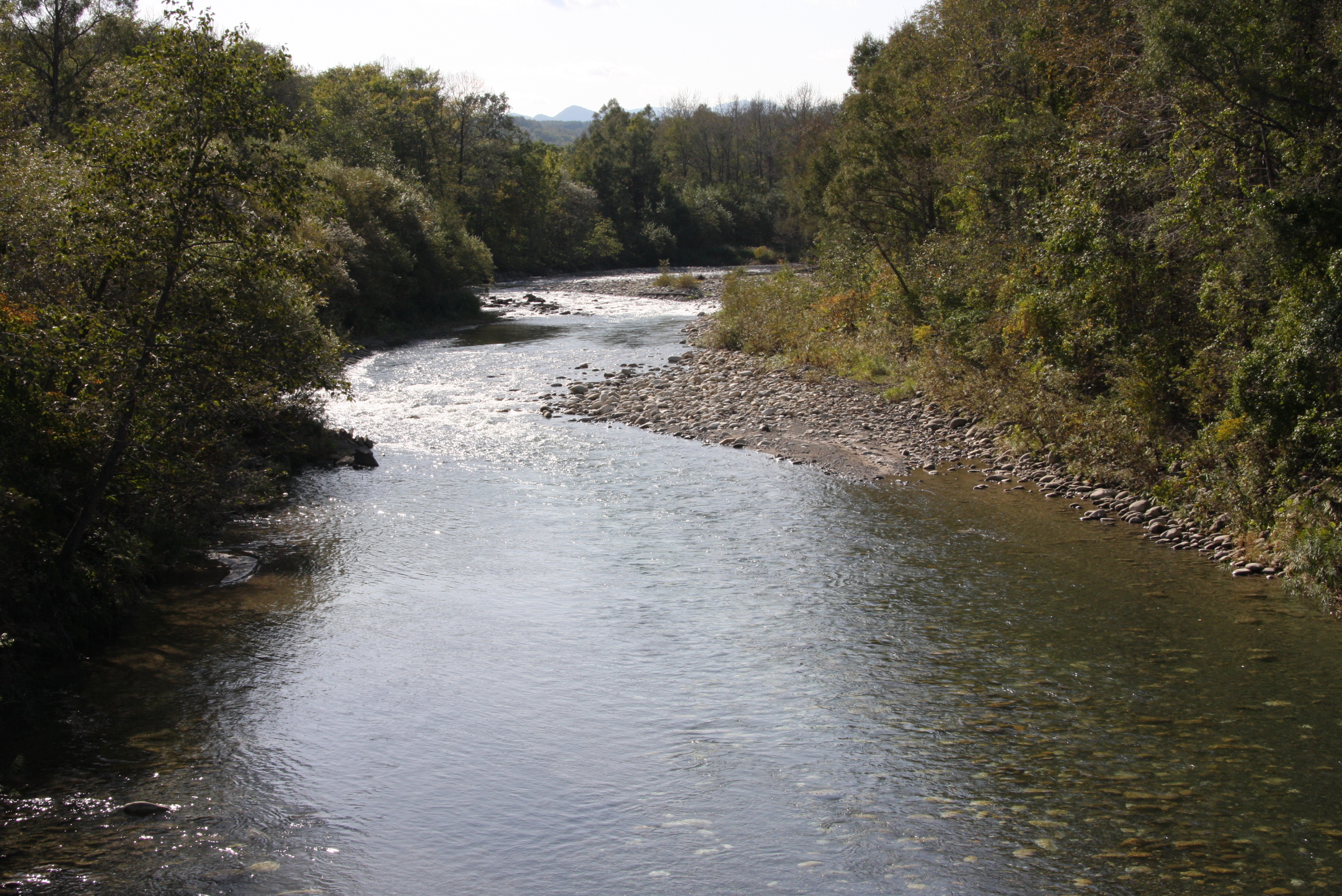 ヌビナイ川 上流方向